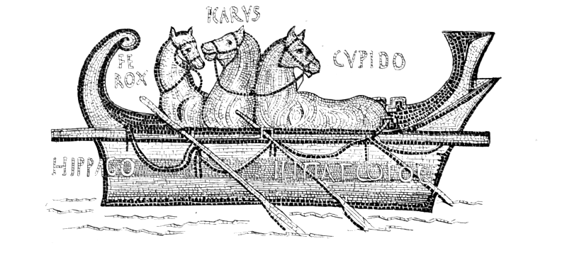 Hippago Gauckler